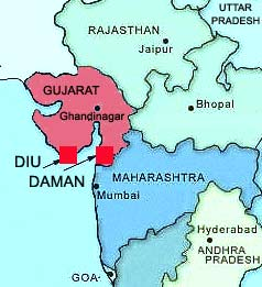 Indien, Diu and Daman, karta, egentillv.